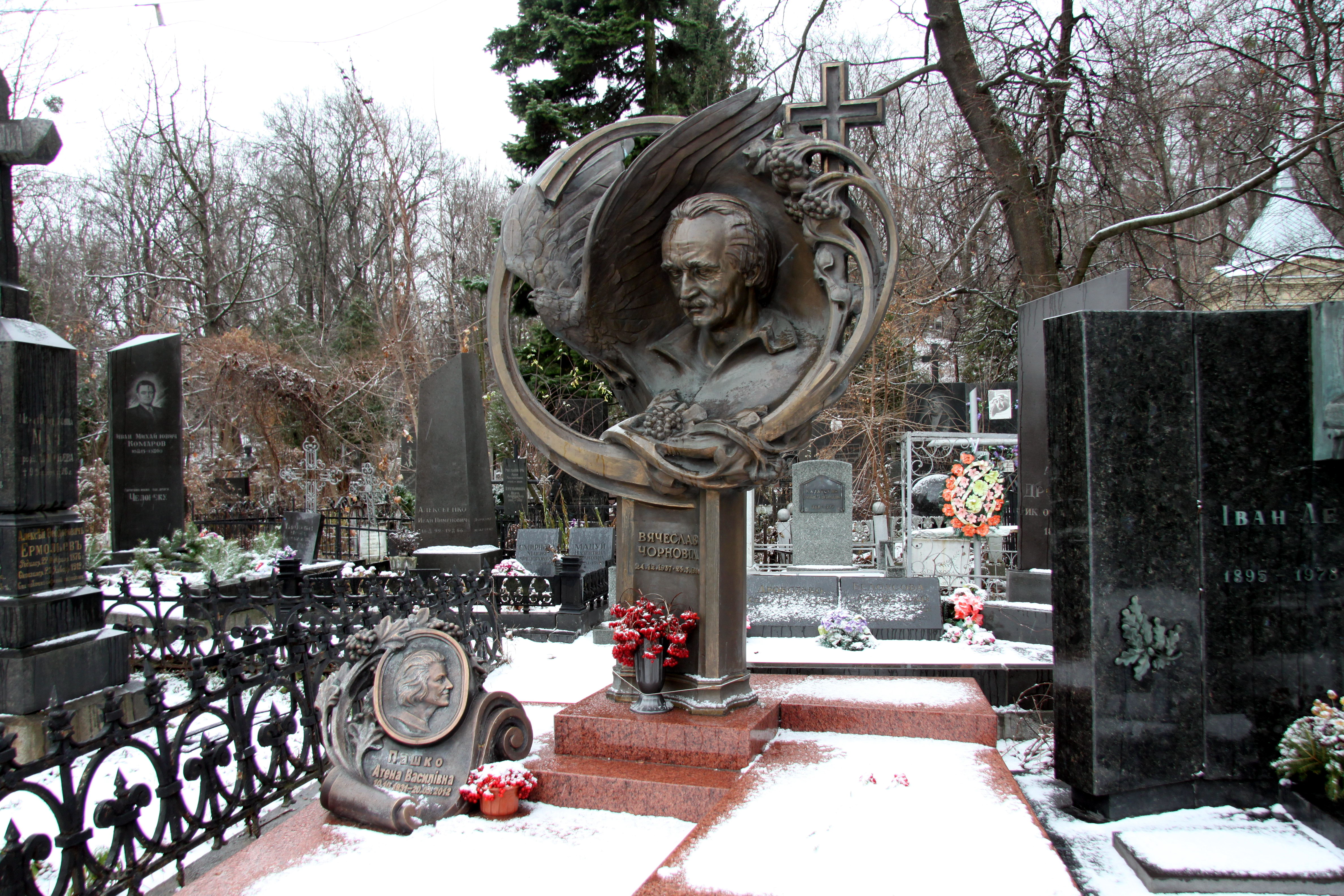 Могила Чорновола В. М. політичного діяча, Байкова вул., 6, Київ